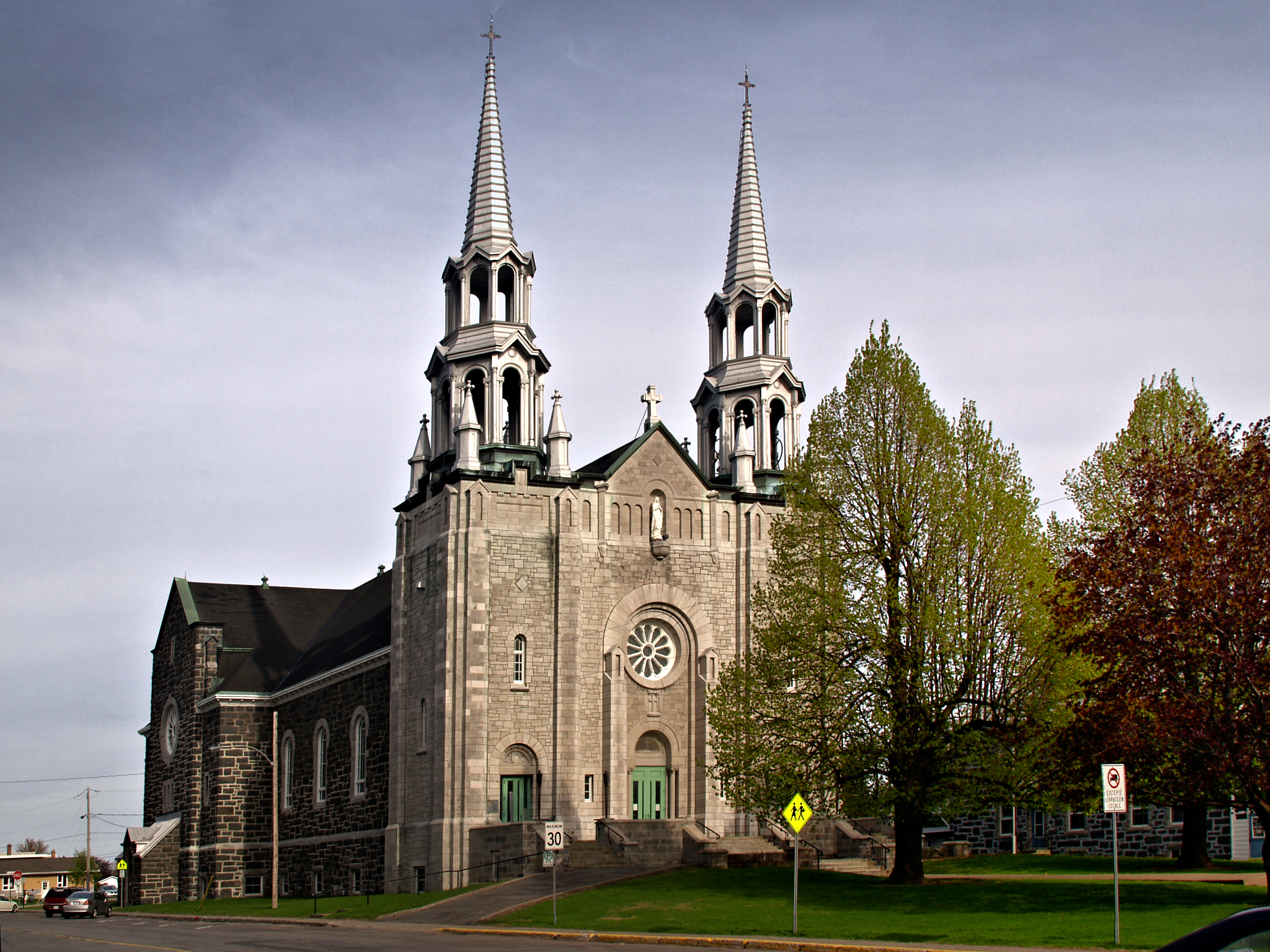 Marieville (Québec) - Église Saint Nom de Marie